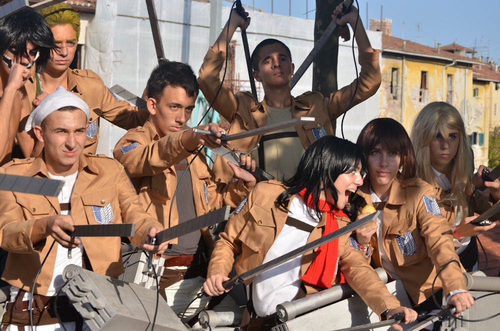 Lucca comics & games 2013